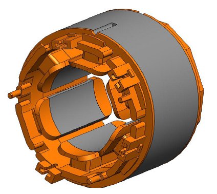 Umspritzter Vollblechschnittstator